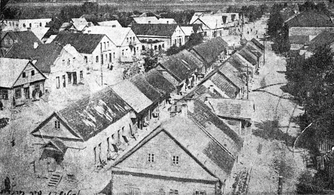 Беларуская (тарашкевіца): Васілішкі (Vasiliški), пляц Рынак (plac Rynak)